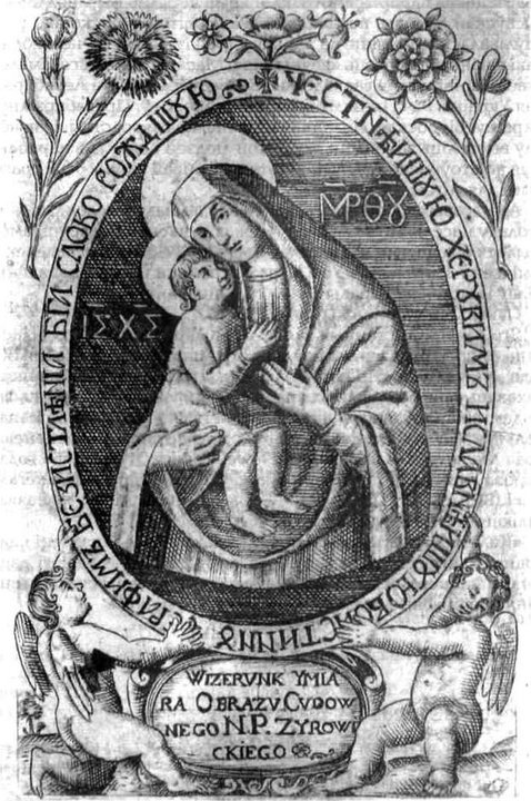 Ггавюра на меди